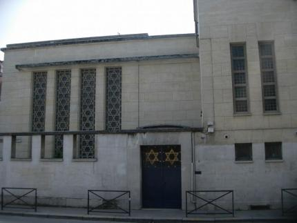 Façade de la synagogue de Rouen, 55 rue des Bons Enfants 76000 ROUEN